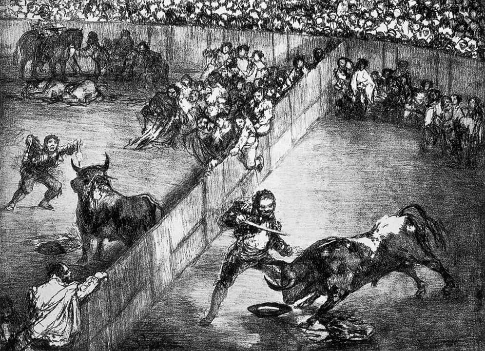 «Plaza partida» Litografía perteneciente a "Los toros de Burdeos"